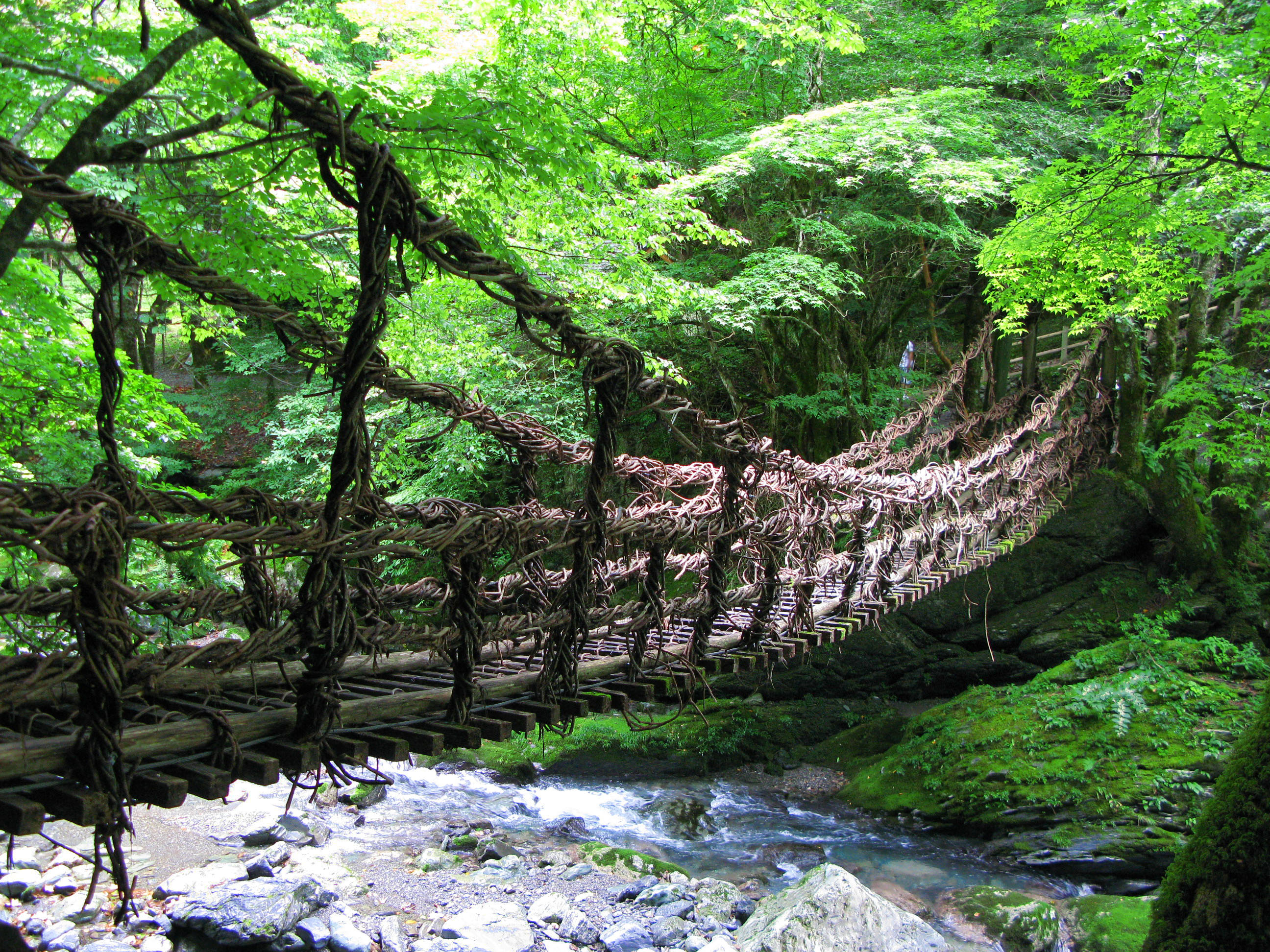 奥祖谷二重かずら橋 女橋（徳島県三好市） Category:橋画像 Category:三好市の画像